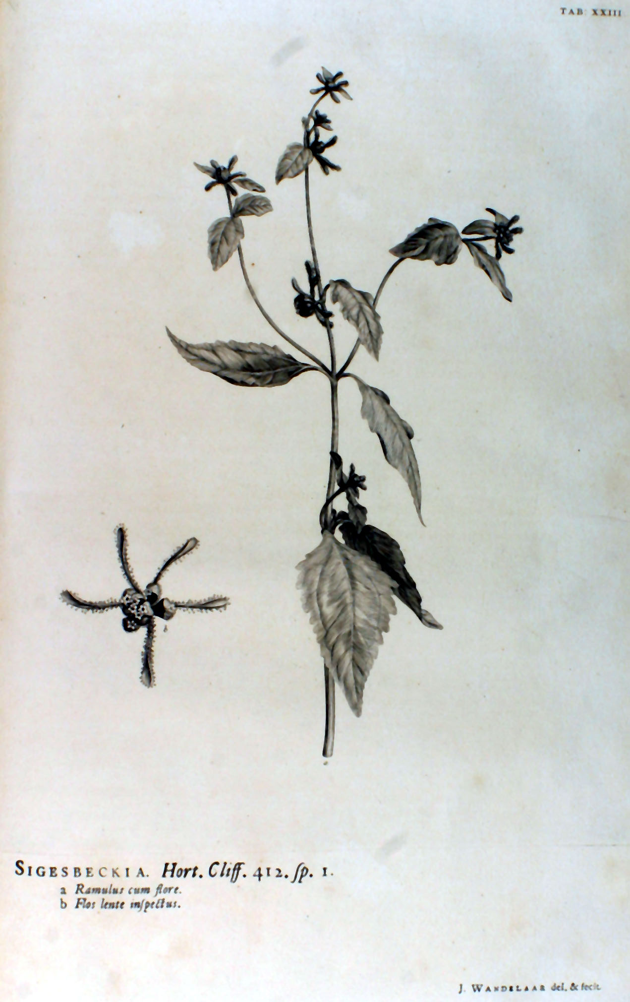 Tafel XXIII. aus Carl von Linnés Hortus Cliffortianus, 1. Auflage, 1737, mit Sigesbeckia